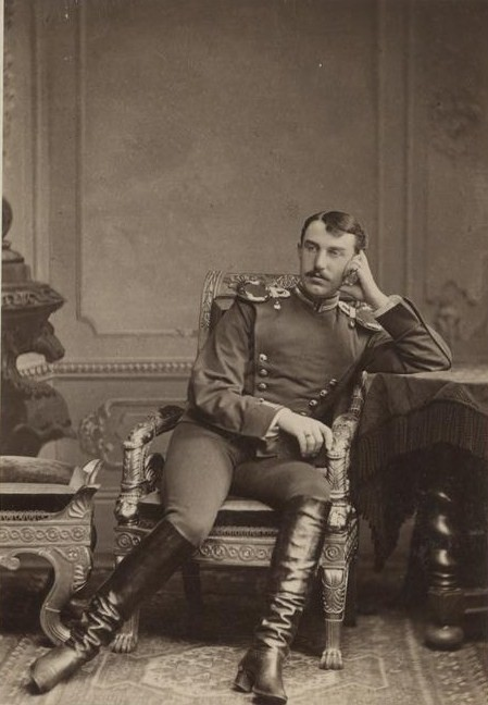 Густав Бирон Курляндский (1859—1941)